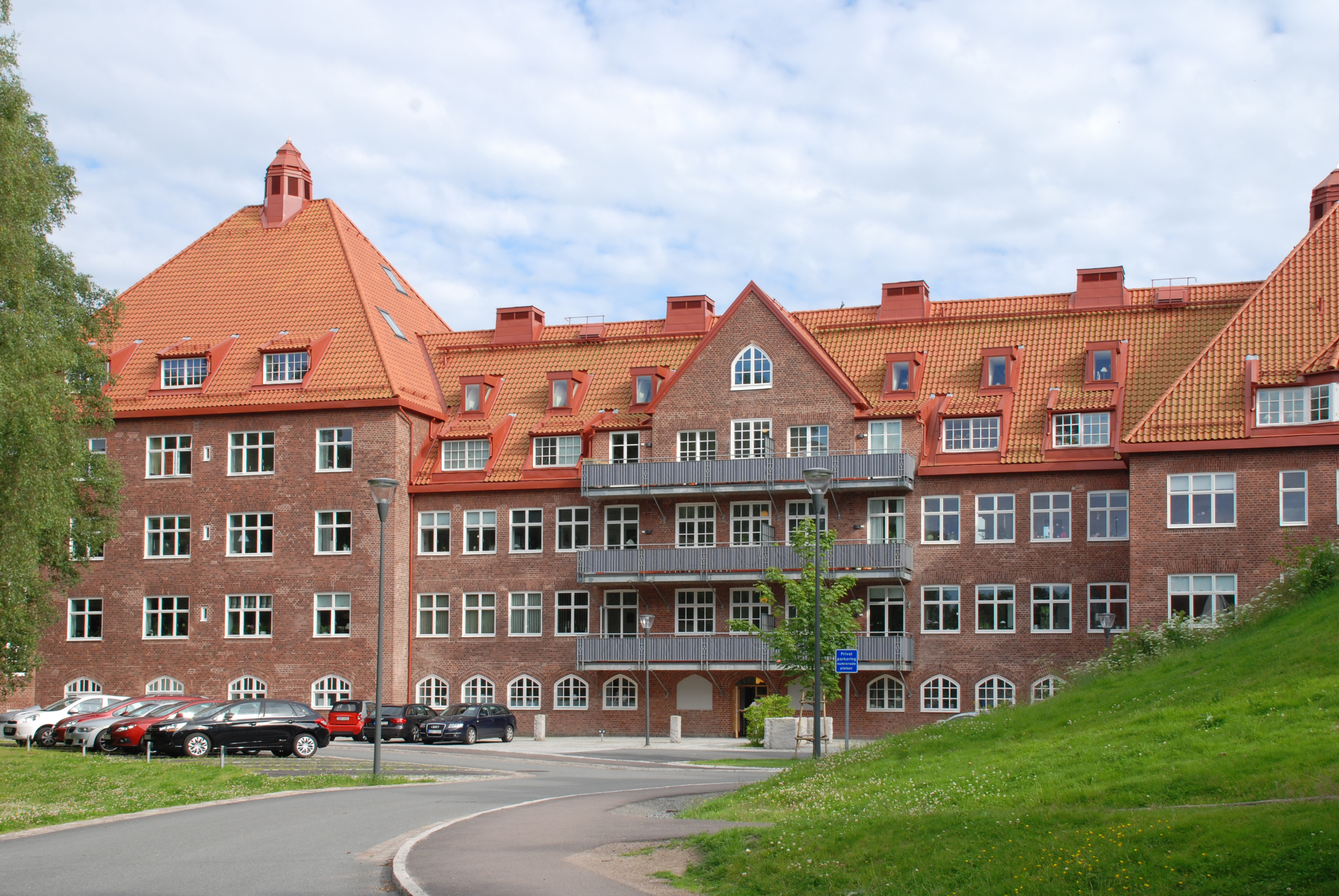 F.d. Renströmska sjukhuset i stadsdelen Kålltorp i Göteborg. Byggnaden är numera bostadshus.